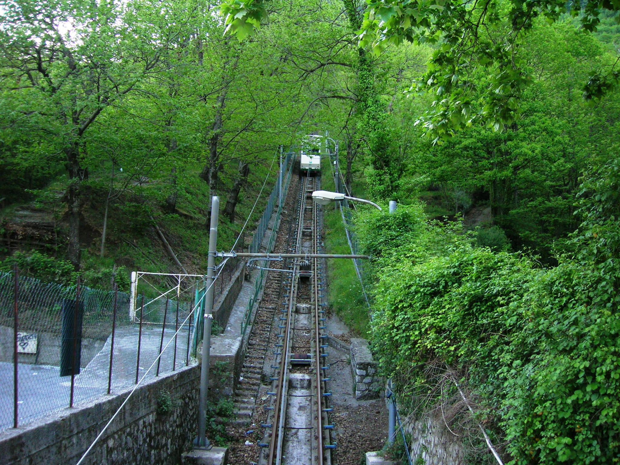 Funicolare in corsa